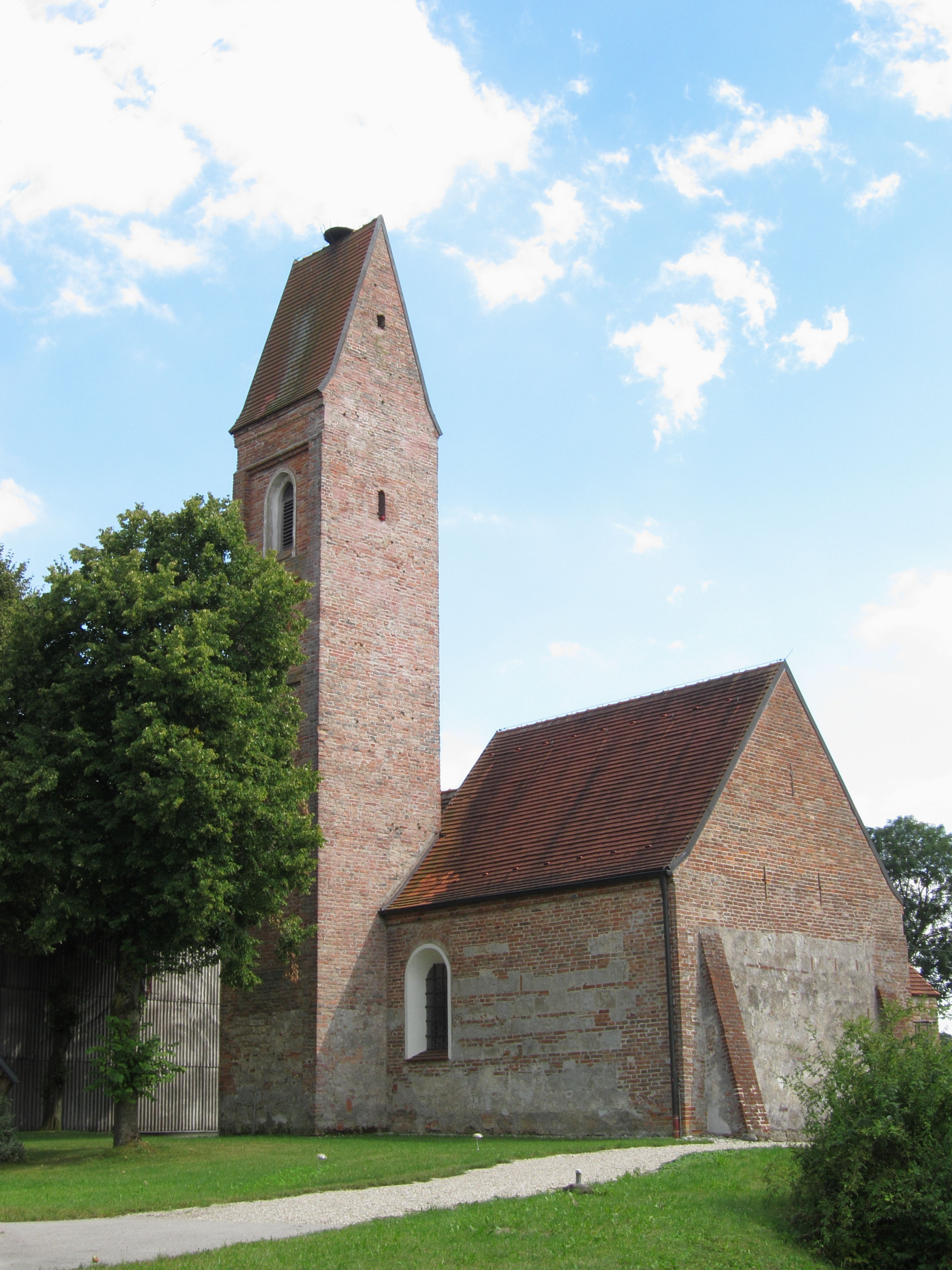 Sonnendorf; katholische Filialkirche St. Martin, spätgotischer Backsteinbau mit eingezogenem polygonalem Chor und romanischen Bauteilen, Turm 14. Jahrhundert, ansonsten 2. Hälfte 15. Jahrhundert; mit Ausstattung.